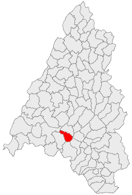 Categorie:Hărţi ale judeţului Bihor